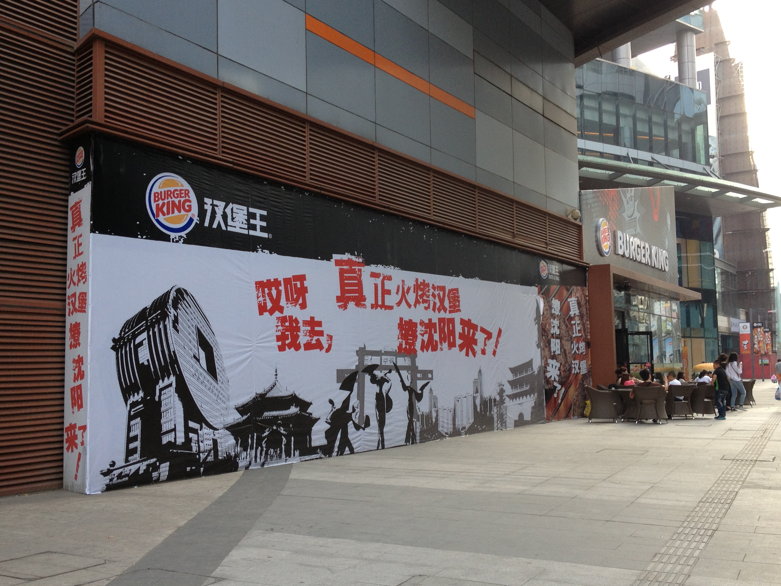 中文（中国大陆）: 汉堡王沈阳中粮大悦城分店